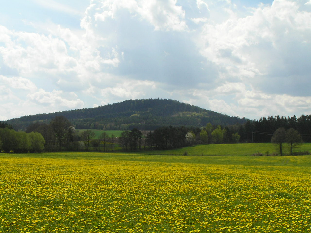 Pohled na Hradiště od Radošovic